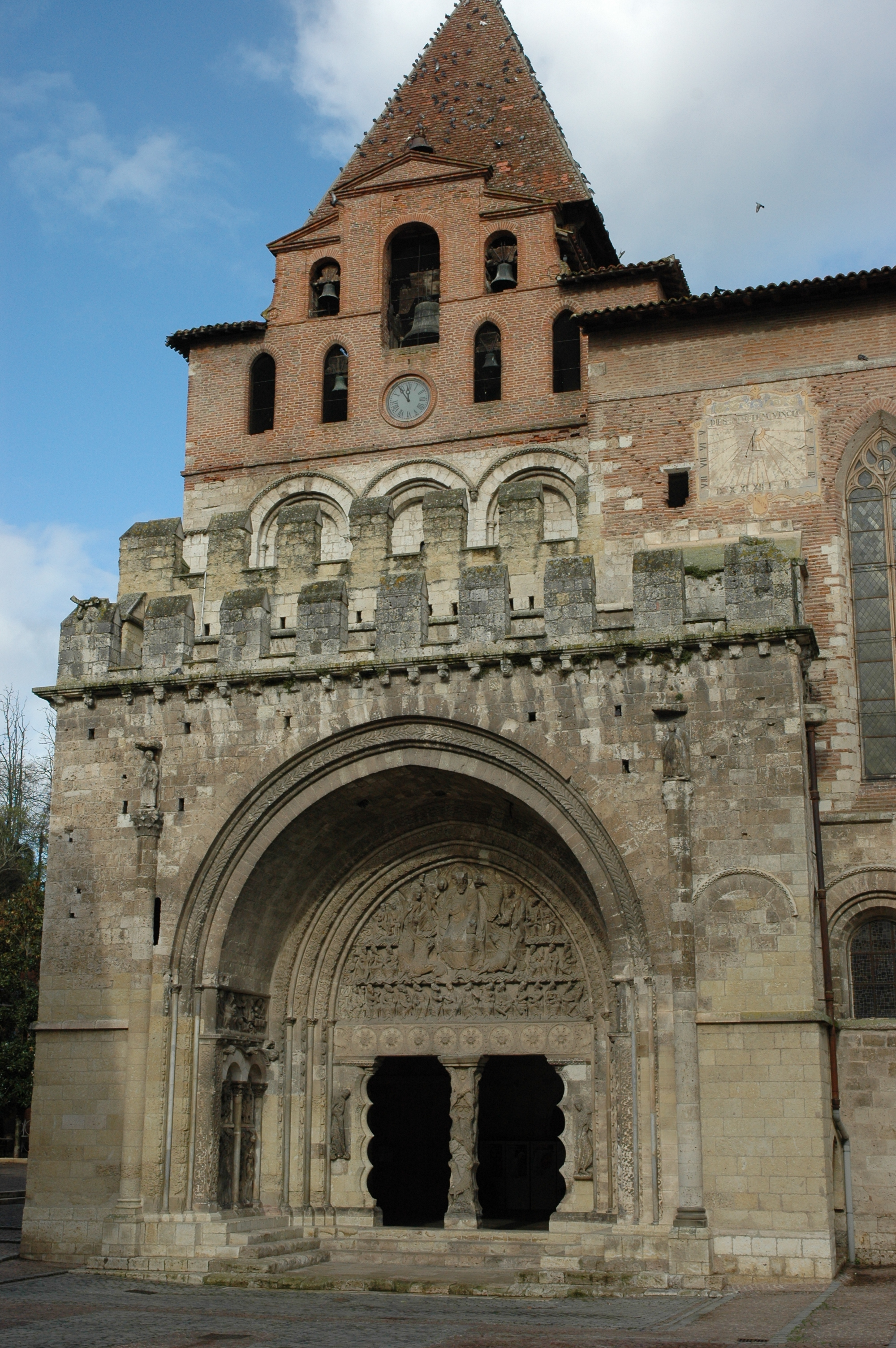 Abadia de Saint-Pierre de Moissac - Portalada sud